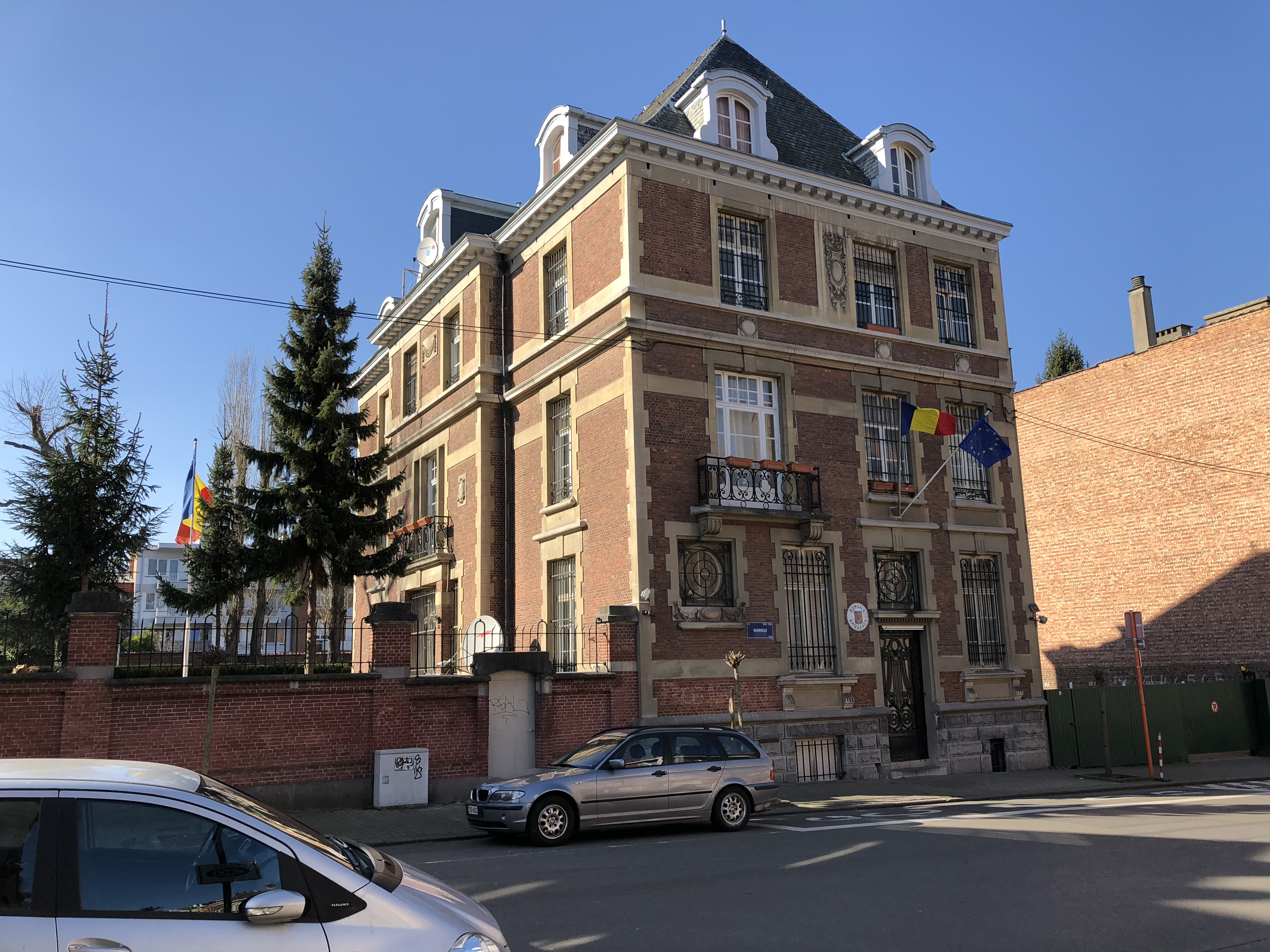 Ambassade de Roumanie à Bruxelles